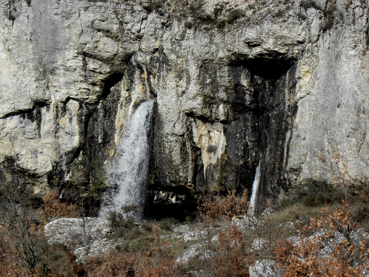 Surgencia 'La Yeguamea' en el término de Fuentedra, Burgos, España. Vierte al río Odra.